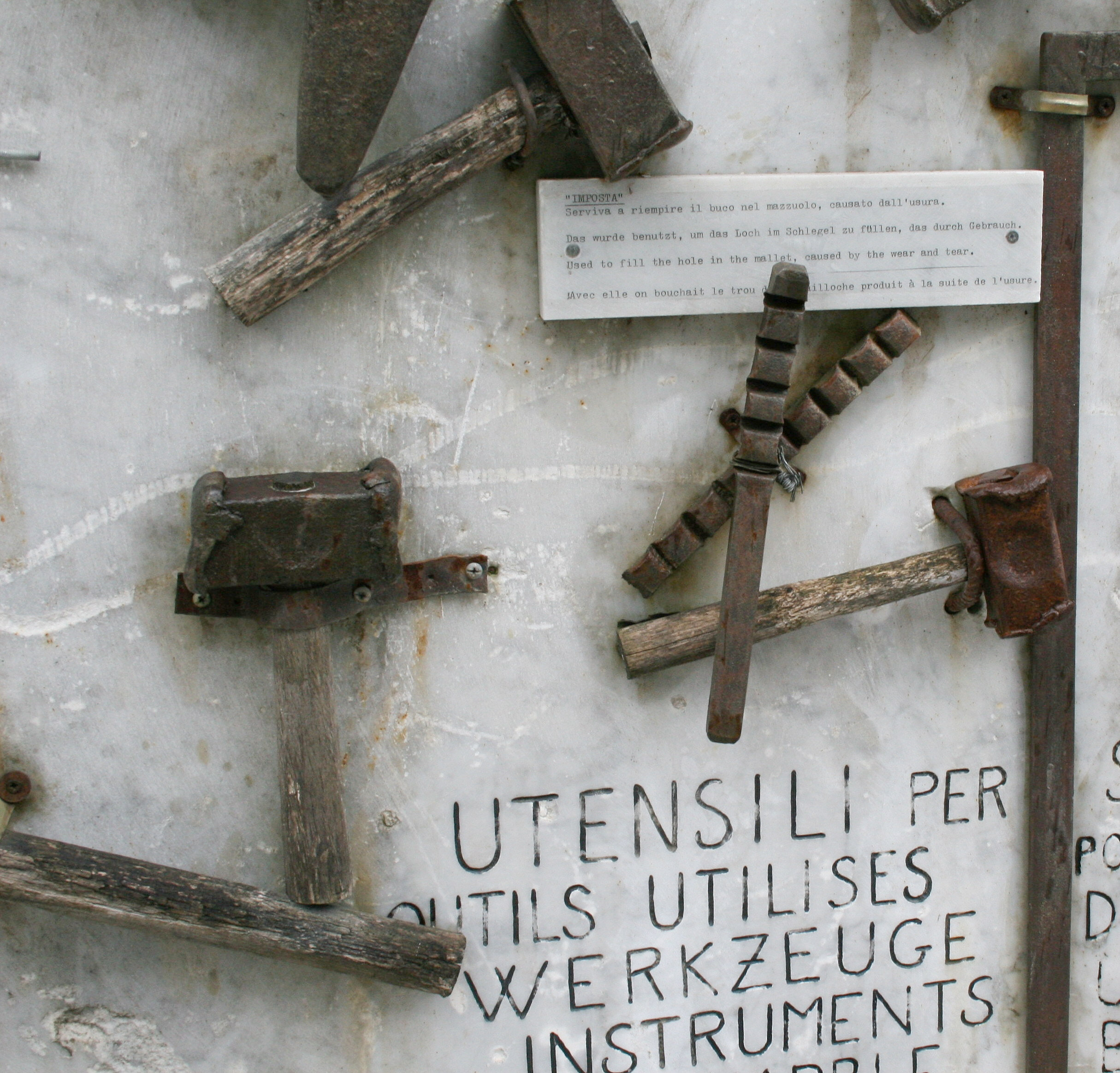 Marmor-Fäustel